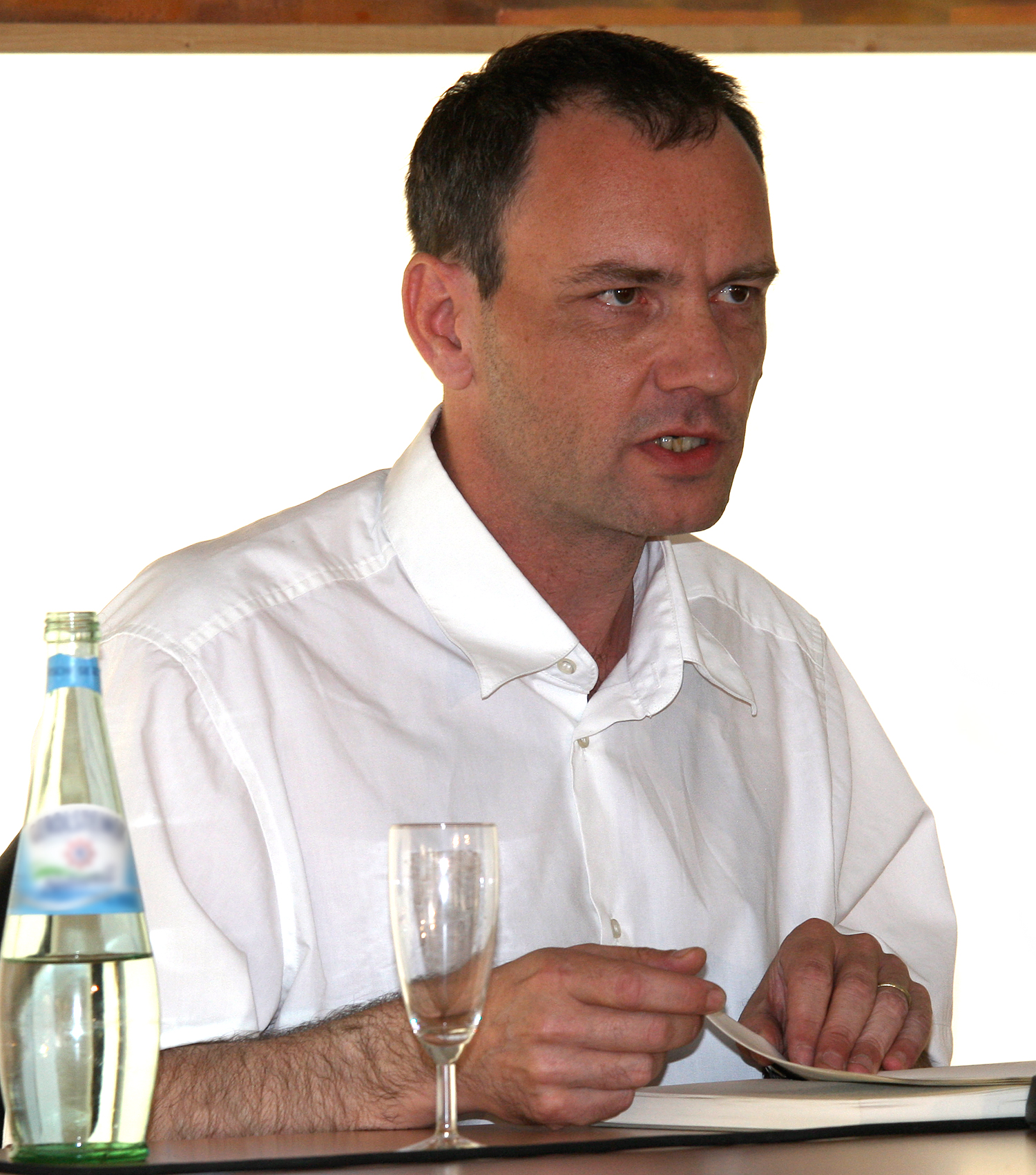 Helmut Krausser, deutscher Schriftsteller, Dichter und Bühnenautor, bei einer Lesung in Köln